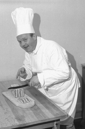 Skuespilleren Willie Hoel.